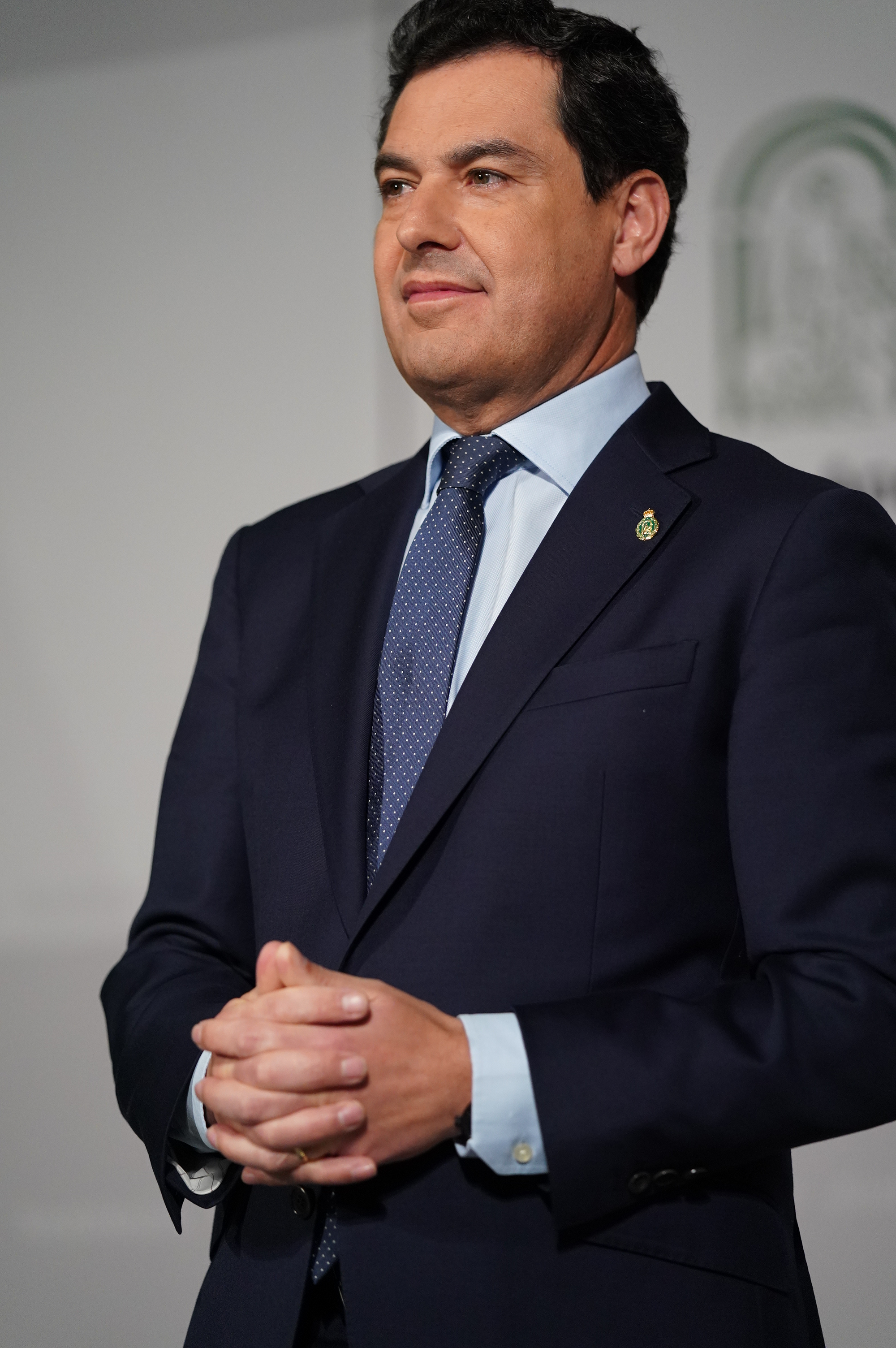 El presidente Juanma Moreno ha presidido la reunión del Comité Ejecutivo para el Control, Evaluación y Seguimiento de Situaciones Especiales, que ha analizado la evolución de la infección por coronavirus Covid-19 en Andalucía. Posteriormente ha ofrecido una declaración institucional. _ _ Fotografía oficial de la Junta de Andalucía. Se pone a disposición solamente para su publicación por las organizaciones de noticias y/o para la impresión de uso personal por parte del sujeto o sujetos de la fotografía. La fotografía no puede ser manipulada de ninguna manera y no se puede utilizar en materiales comerciales o políticos, anuncios, productos o promociones que de alguna manera sugieran aprobación o respaldo de la Junta de Andalucía.